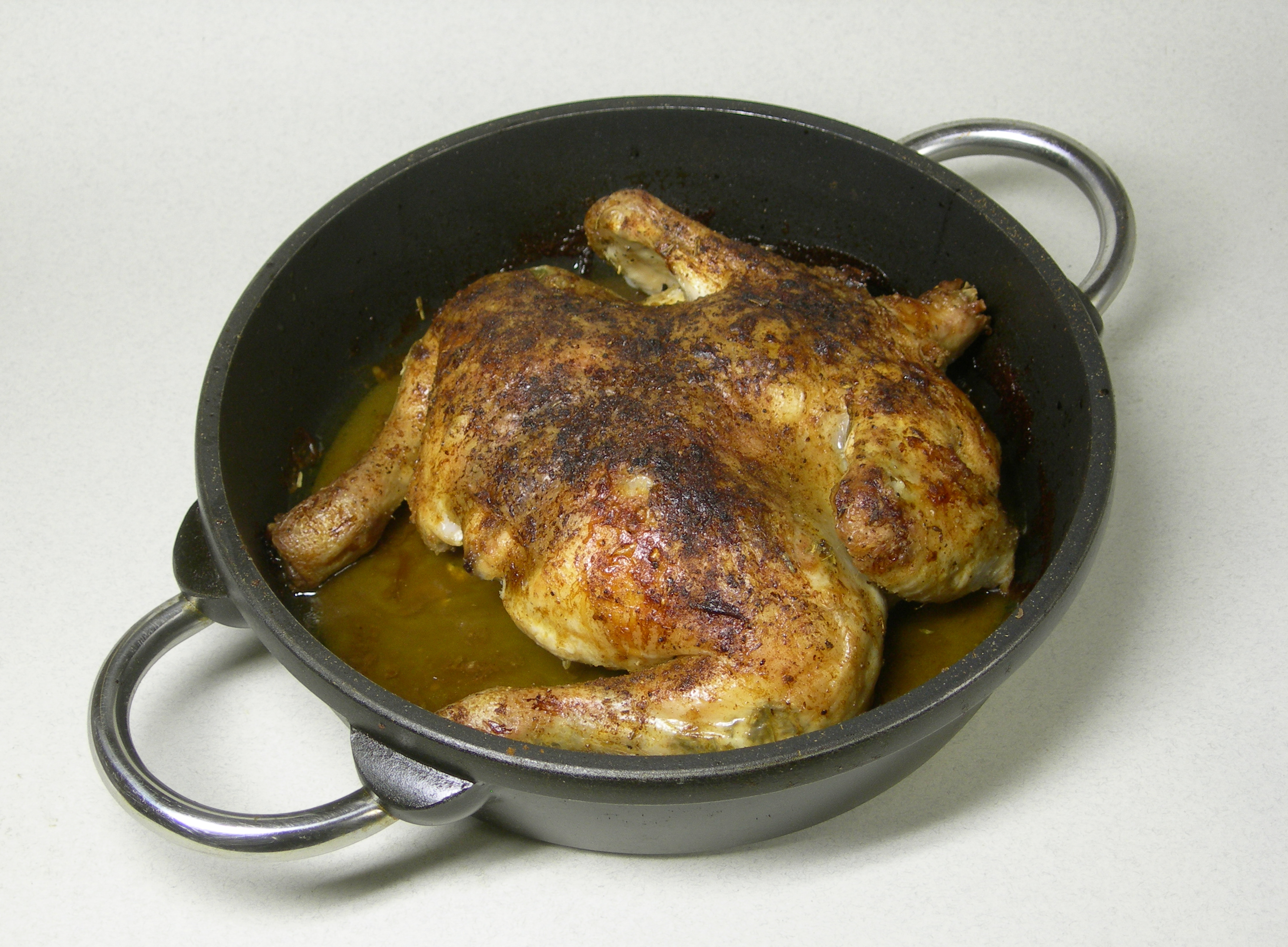 Pollo al mattone („Hähnchen auf Backsteinart“)